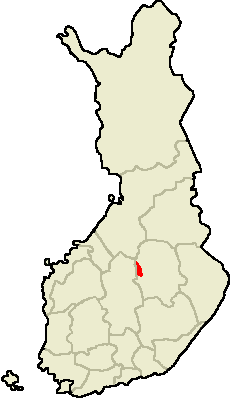 Own work